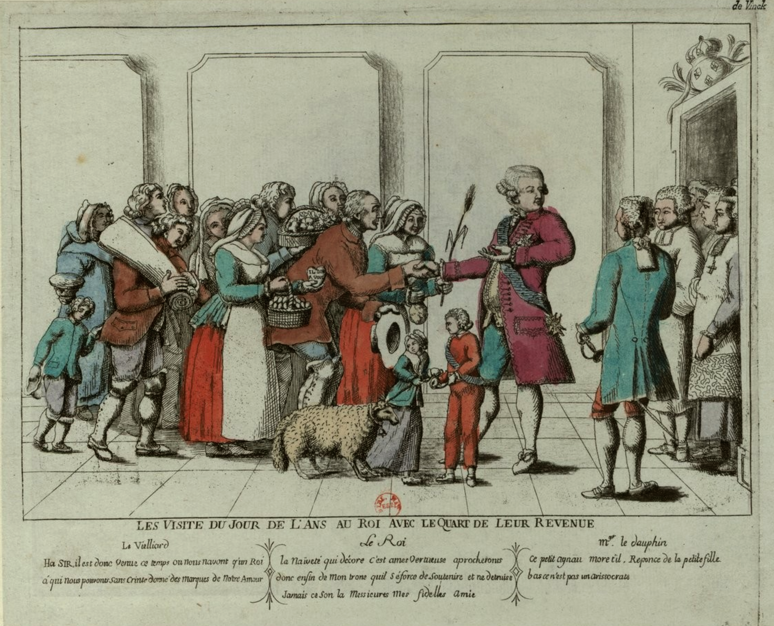 Anonyme.- Les Visite du Jour de l'Ans au Roi Avec le Quart de Leur Revenue : Le Vieillard : Ha SIR il est donc venue ce temps ou nous navont qu'un Roi à qui nous pouvons sans Crinte, 1790